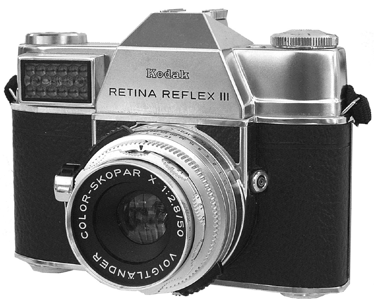 Dieses Reflex-Modell der Kodak Retina wurde 1960 eingeführt und bis 1964 produziert. Es erlitt das gleiche Schicksal wie die anderen deutschen Spiegelreflexkameras mit Zentralverschluss. Die Konstruktion mit dem Hinterlinsen-Verschluss begrenzte die Brennweite der Zusatz-Objektive und ein außenliegender Selen-Belichtungsmesser war bald nicht mehr Stand der Technik. Die japanischen SLR mit Schlitzverschluss und Innenmessung übernahmen dieses Feld, auch ihres günstigen Preises wegen.Die Objektive zur Retina Reflex waren aber ausgezeichnet. Dazu konnte man nach einer kleinen Manipulation auch die Voigtländer-Objektive der Bessamatic und Ultramatic verwenden (wie im abgebildeten Modell, das mit einem Voigtländer-Skopar bestückt ist). Auf die gleiche Weise kann man auch die Schneider-Objektive der Retina Reflex für die Bessamatic verwendbar machen.Der Selen-Belichtungsmesser der abgebildeten Kamera zeigt übrigens noch genau an!